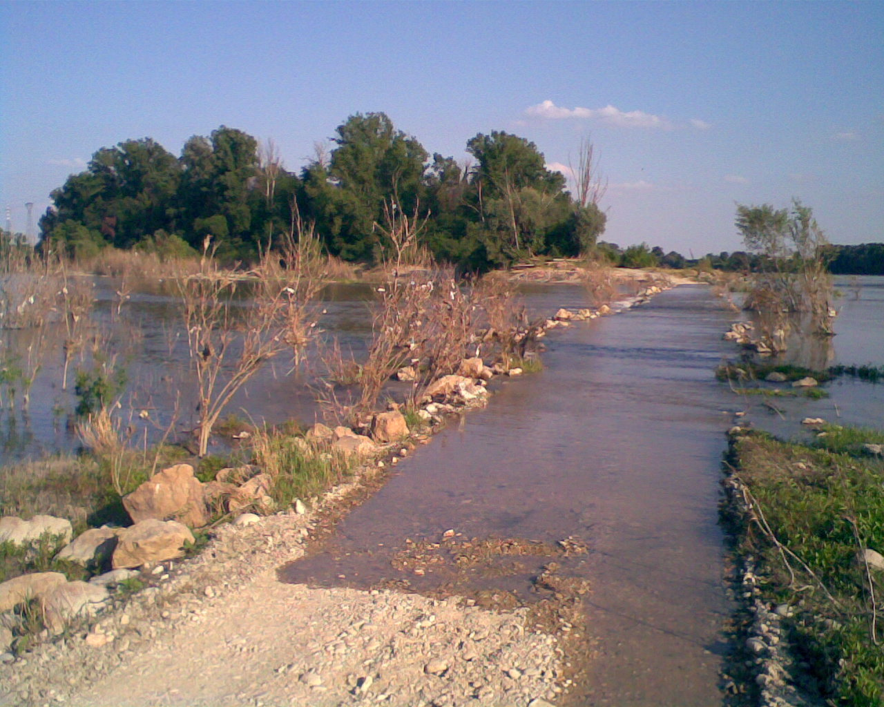 Isola Boschina ved Ostiglia, Italien